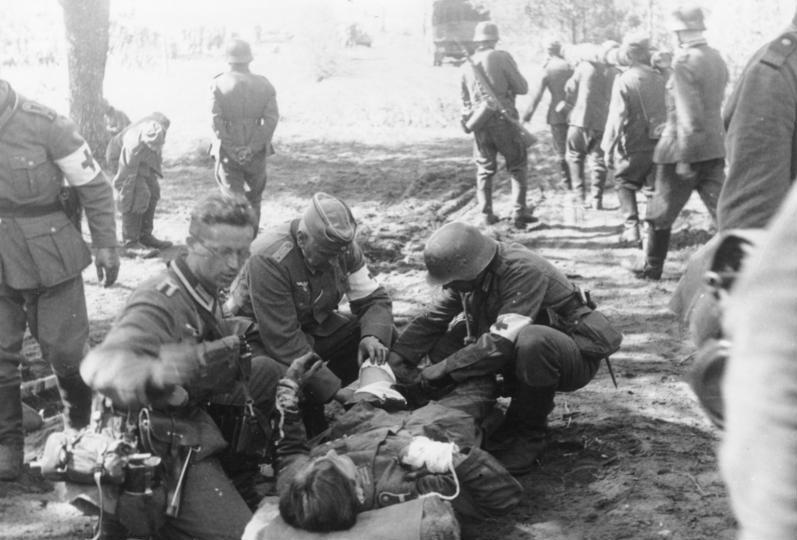 Im Walde von Augustowo. Verwundeter wird auf dem Verbandsplatz verbunden Prop.-Kp. 612, Film 2089/5; Bildberichter: Oberhauser 22.6.41